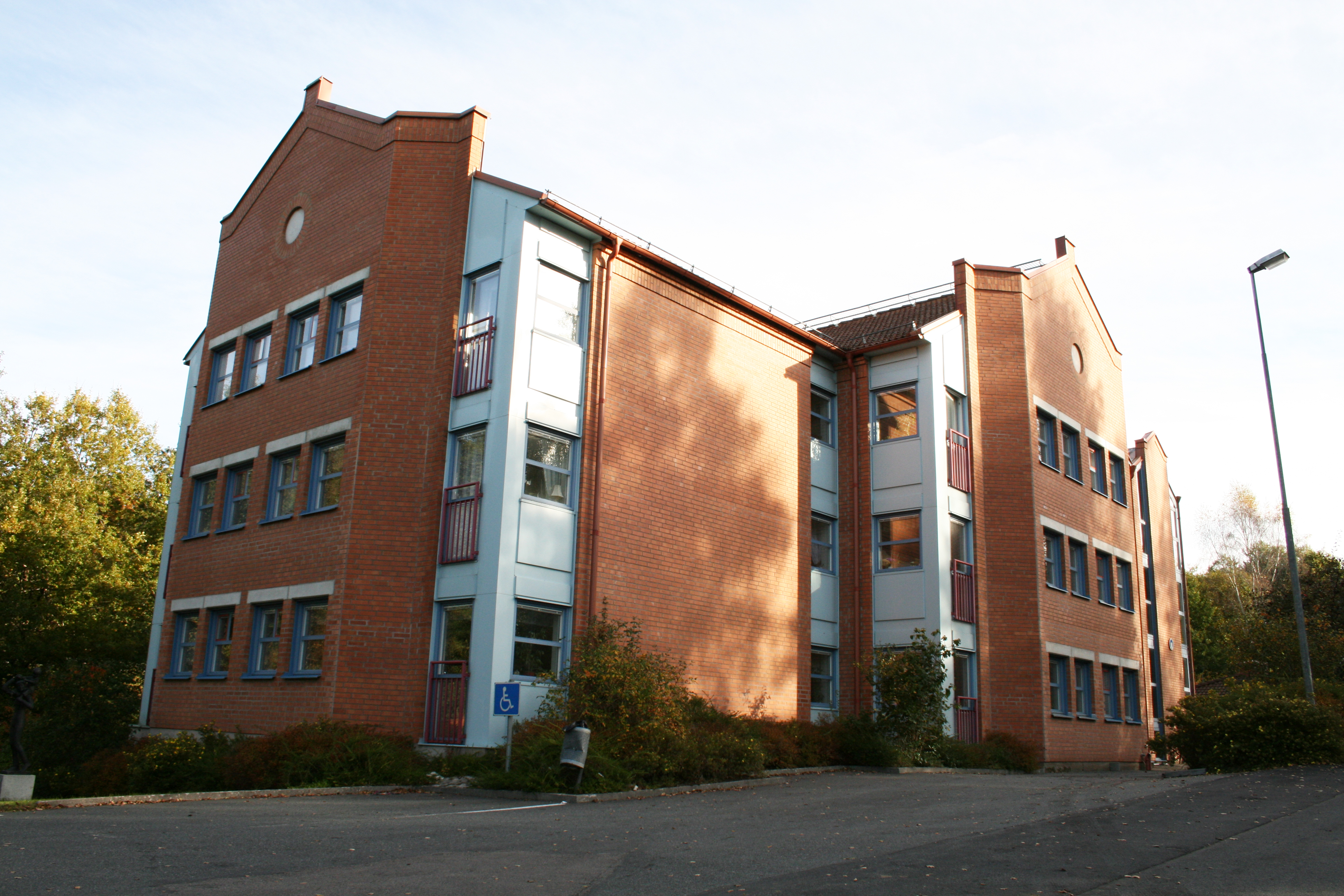 Nya Tollaregården. Ägs och förvaltas av AB Allön, dotterbolag till kommunala bostadsbolaget ABK.